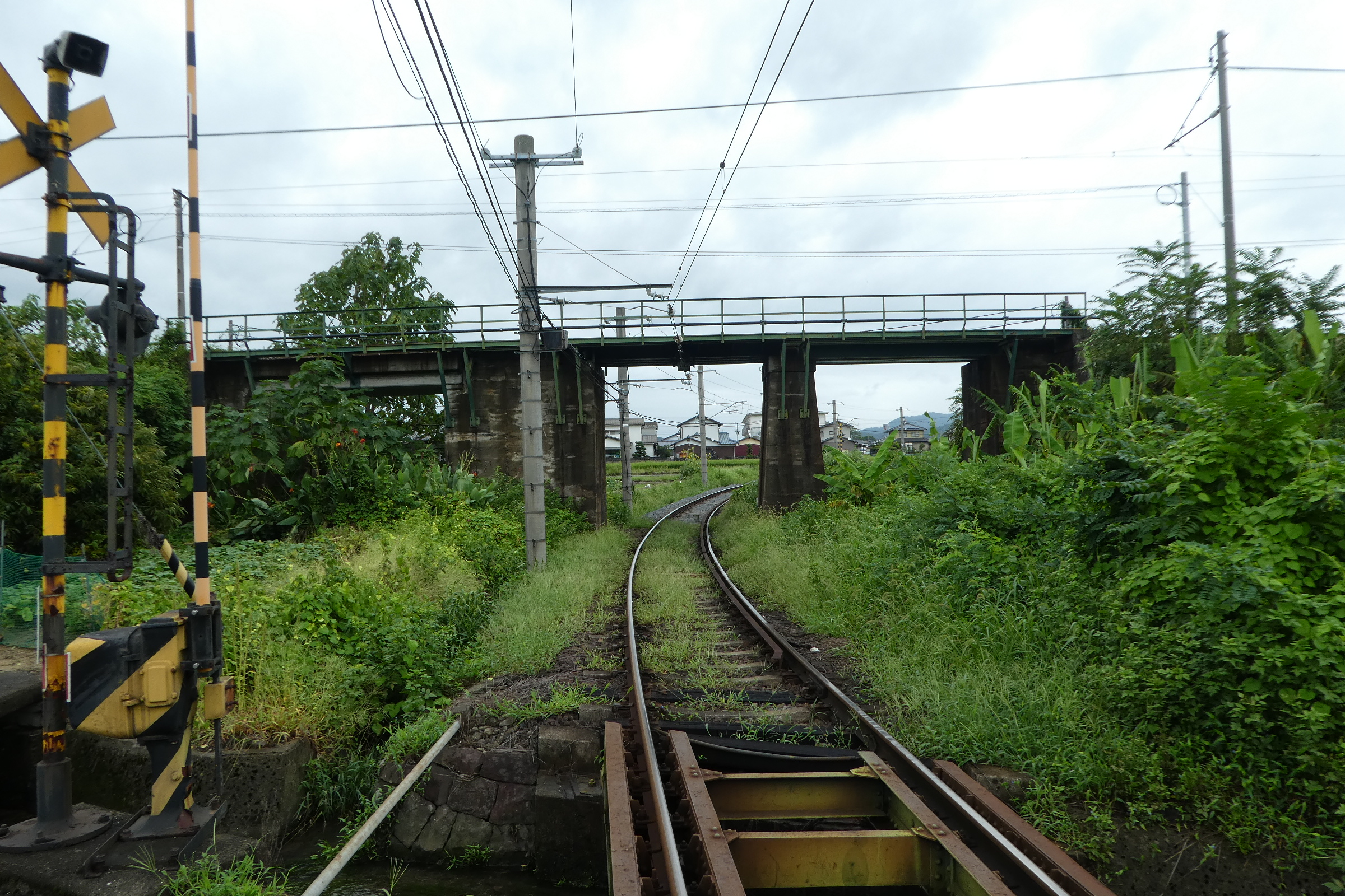 JR土讃線と琴電琴平線の立体交差部。 高架がJR土讃線。中央が琴電琴平線。右側が琴平線複線化用地。左側が琴平急行線跡。